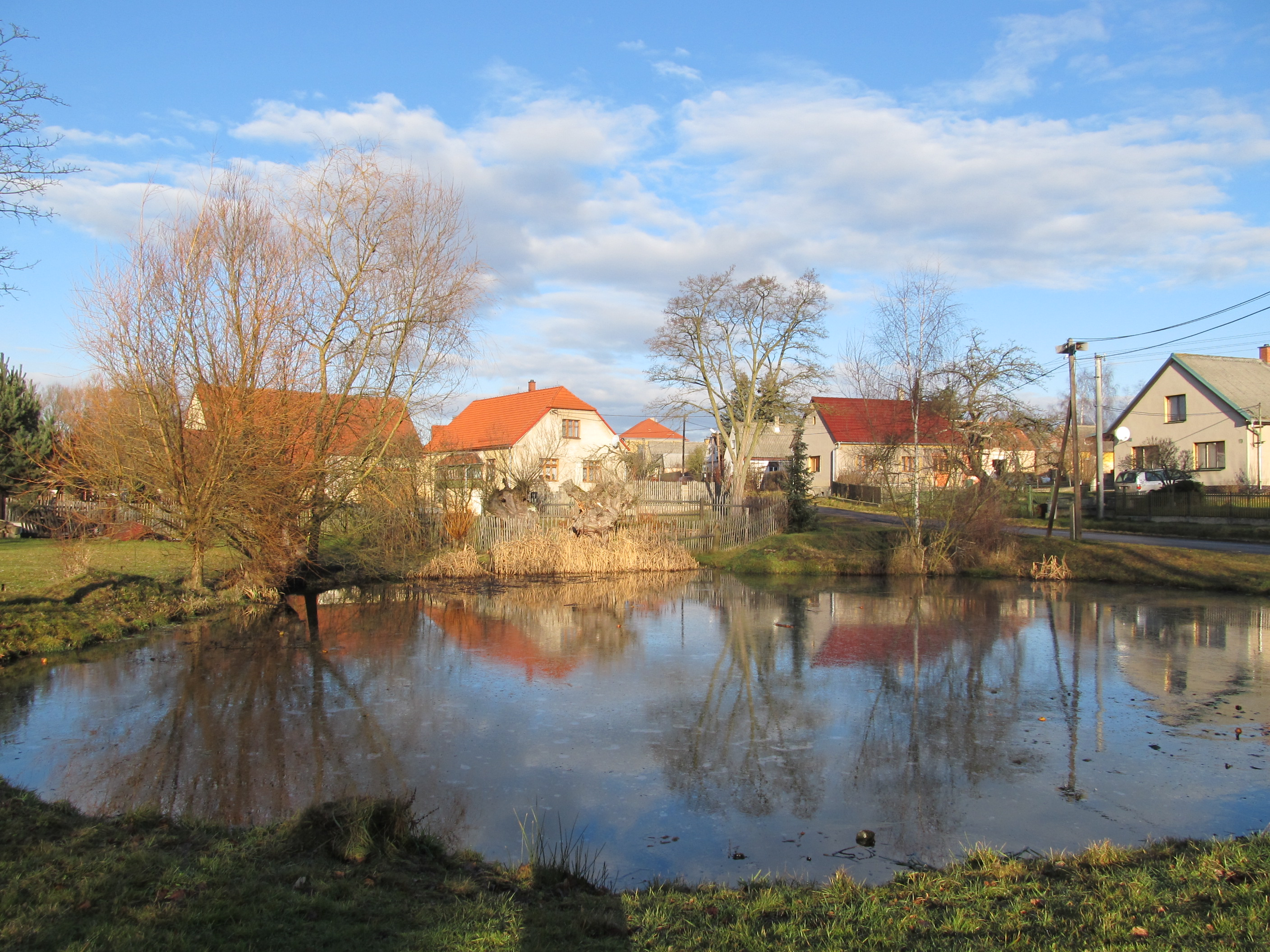 Kůzová (Čistá) - náves